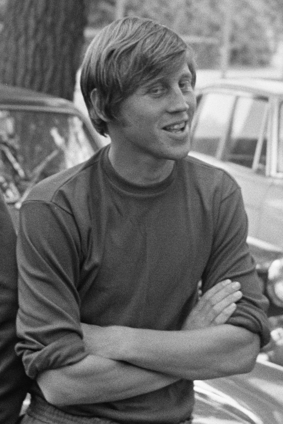 Collectie / Archief : Fotocollectie Anefo Reportage / Serie : Training Ajax in het Amsterdamse Bos Beschrijving : Nieuwe Ajax-spelers, Nico Rijnders Datum : 14 juli 1969 Locatie : Amsterdam, Noord-Holland Trefwoorden : sporttrainingen, voetbal Persoonsnaam : Rijnders, Nico Fotograaf : Fotograaf Onbekend / Anefo Auteursrechthebbende : Nationaal Archief Materiaalsoort : Negatief (zwart/wit) Nummer archiefinventaris : bekijk toegang 2.24.01.05 Bestanddeelnummer : 922-6251